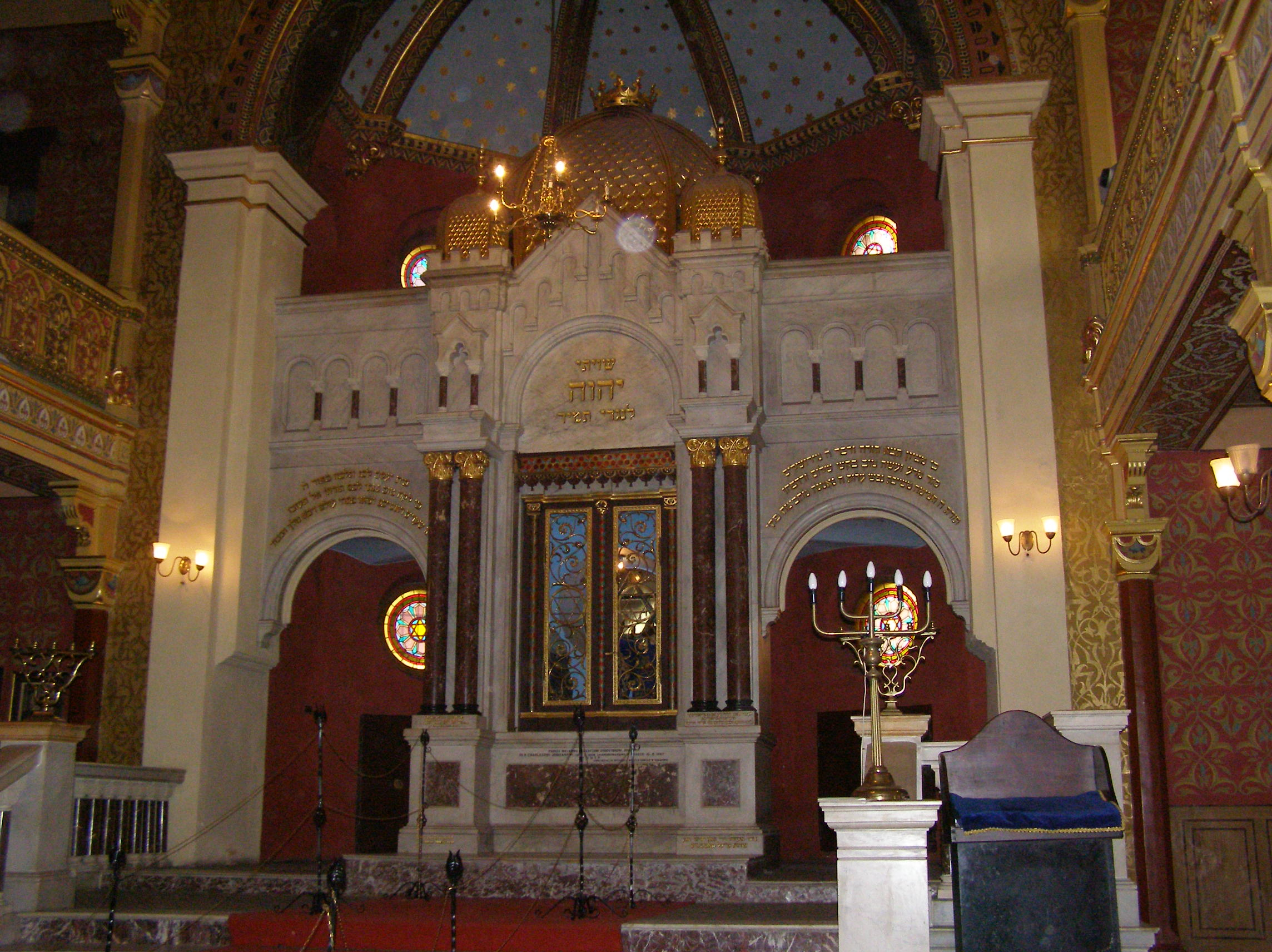 "הטמפל" synagogue, Kraków, Poland.